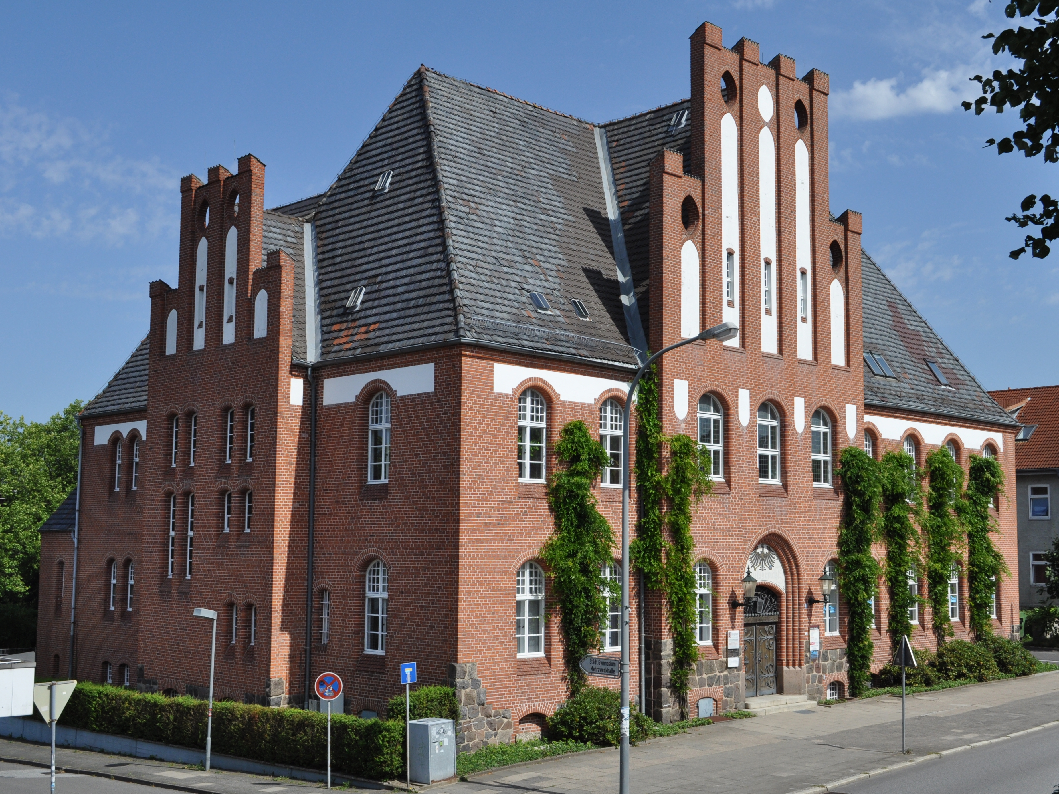 Ehemaliges Amtsgericht an der Hamburger Straße 29 in Bad Segeberg, Blick von der Rantzaukapelle aus. This is a photograph of an architectural monument.